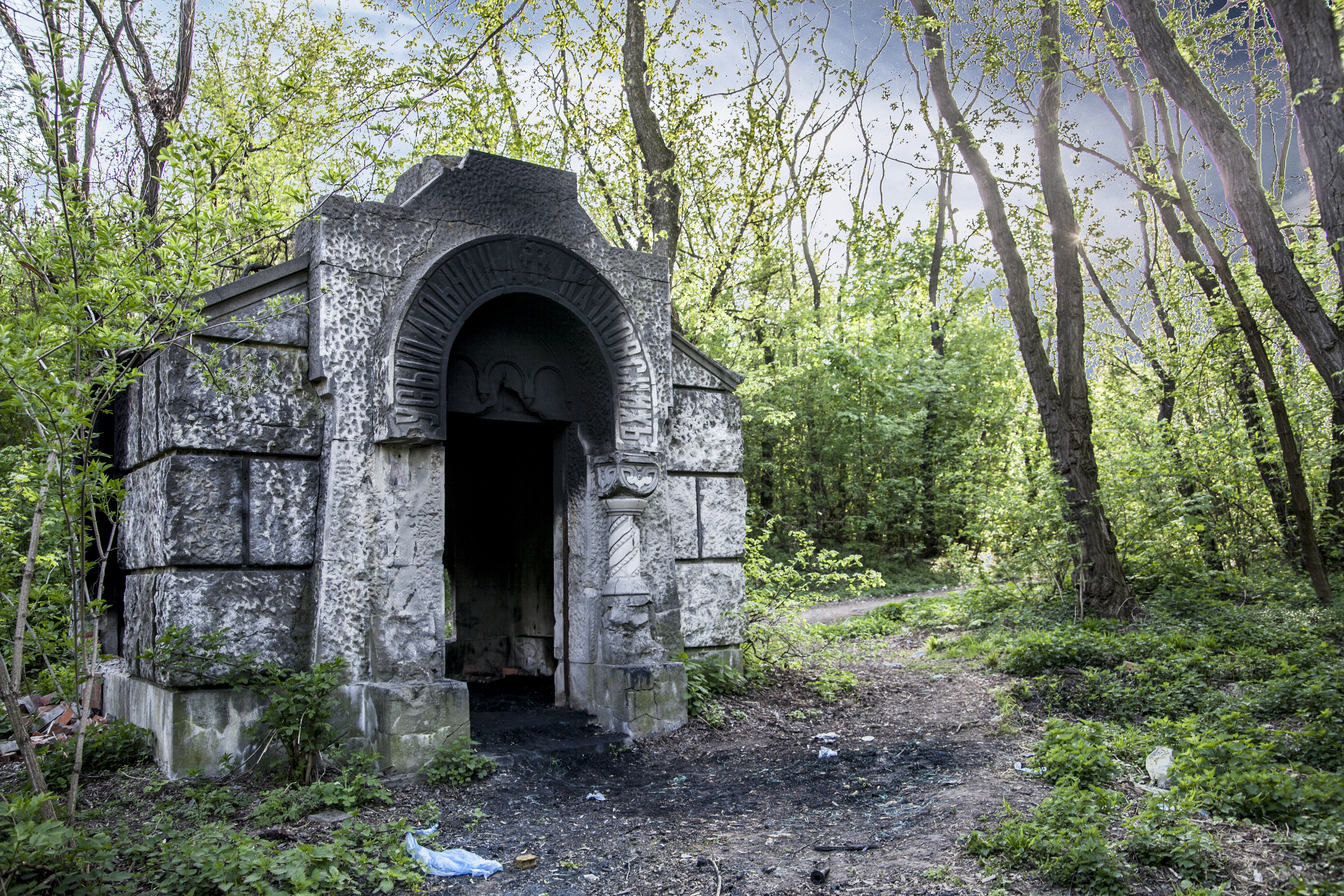 Склеп Качковських